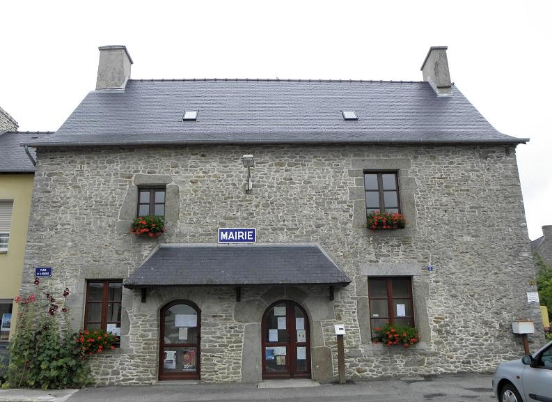 Mairie de Mecé (35).